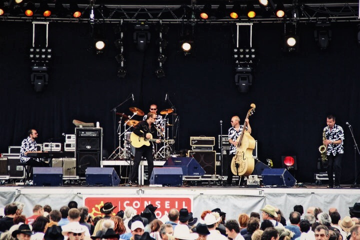 Grupa "Petersons Band" 2004. gadā Francijas kantrī festivālā "Mirande".